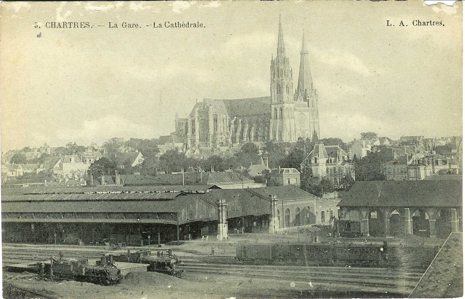 "3. Chartres. - La Gare - La Cathédrale.", Eure-et-Loir (France).